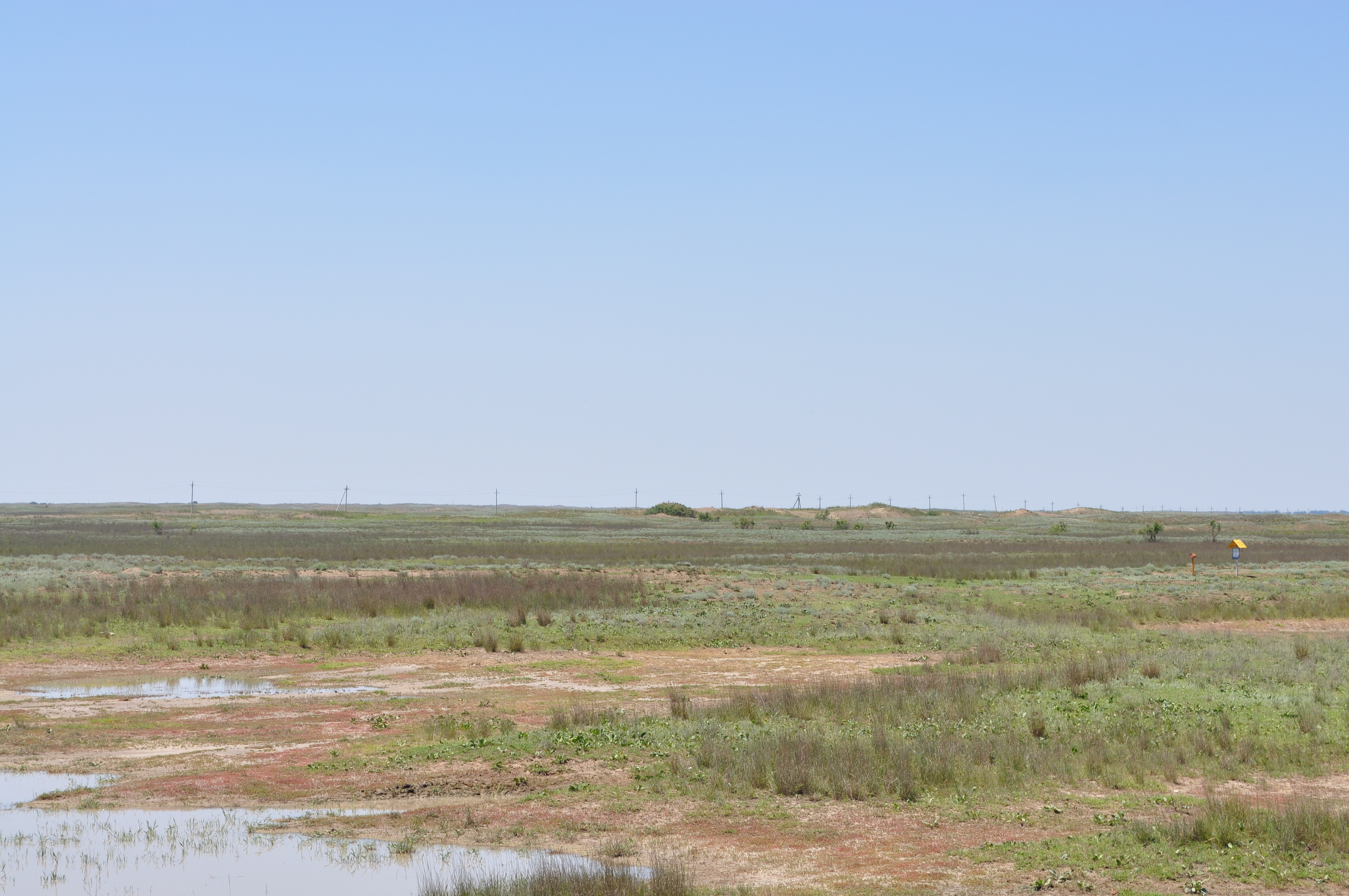 Ногайский заказник: Ногайский район, Дагестан This image is related to the protected area of Russia number 0510029